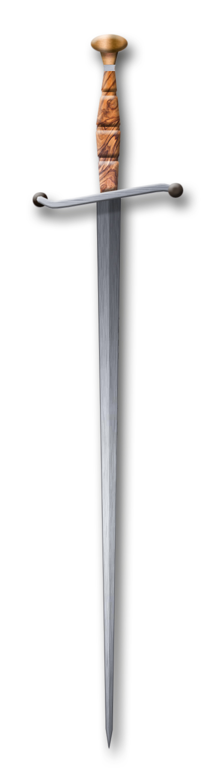 Illustration eines Panzerbrechers (Panzerstechers)